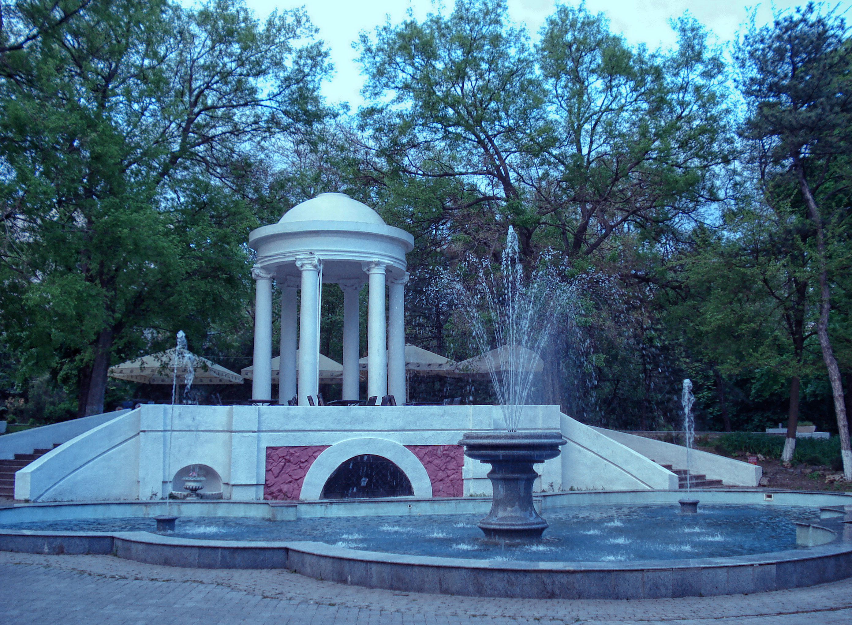 Ротонда над бастионом: улица Большая Садовая, 127, Ростов-на-Дону, Ростовская область